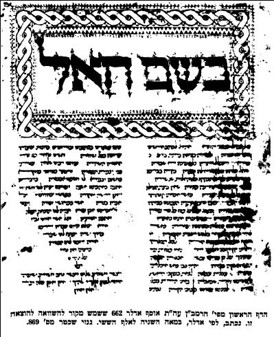 פירוש הרמב"ן על התורה - כתב יד אוסף אדלר 662, גנזי שכטר 869; תצלום העמוד הראשון מתוך כתב יד המתוארך (על ידי אדלר) לאמצע המאה ה-15 לספירה.